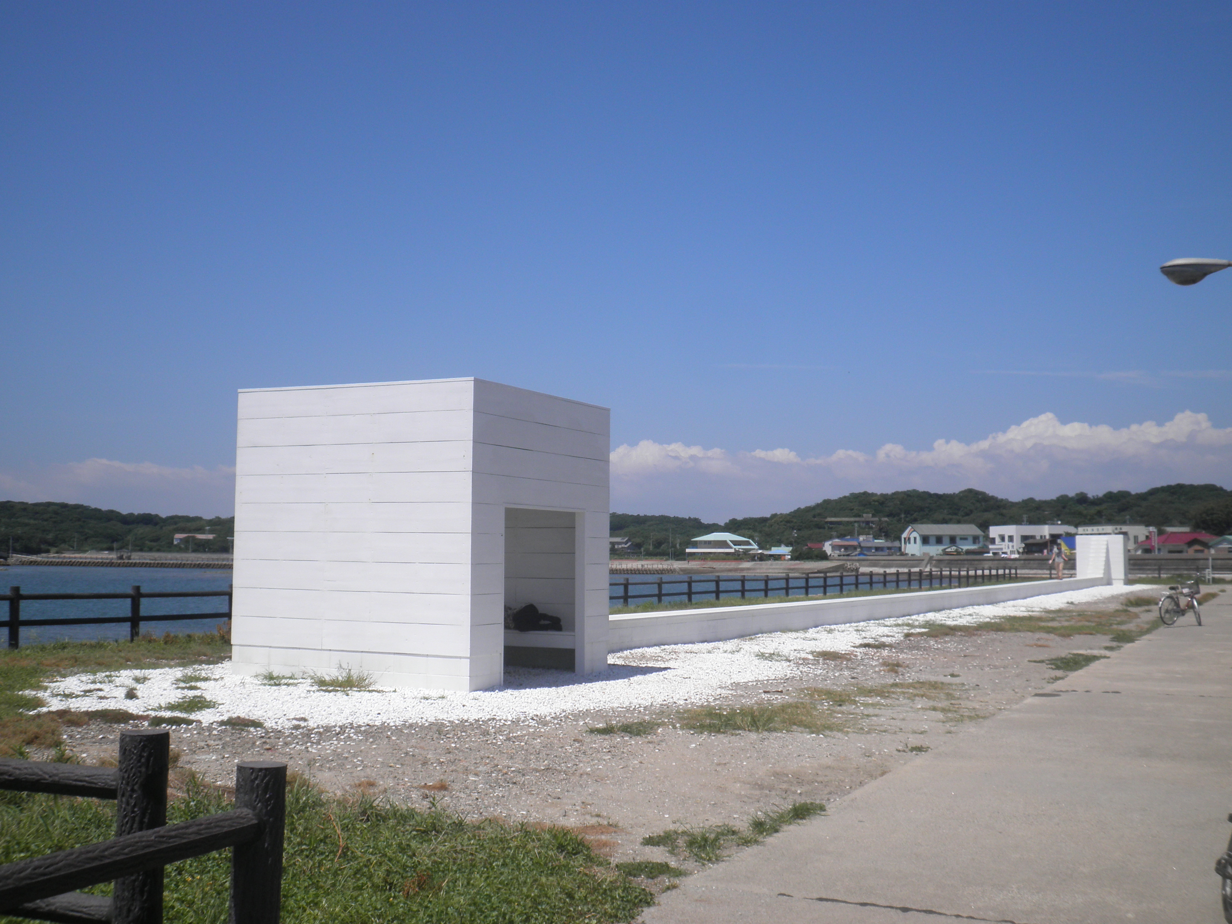 愛知県西尾市一色町の佐久島、大島への桟橋にあるイーストハウス